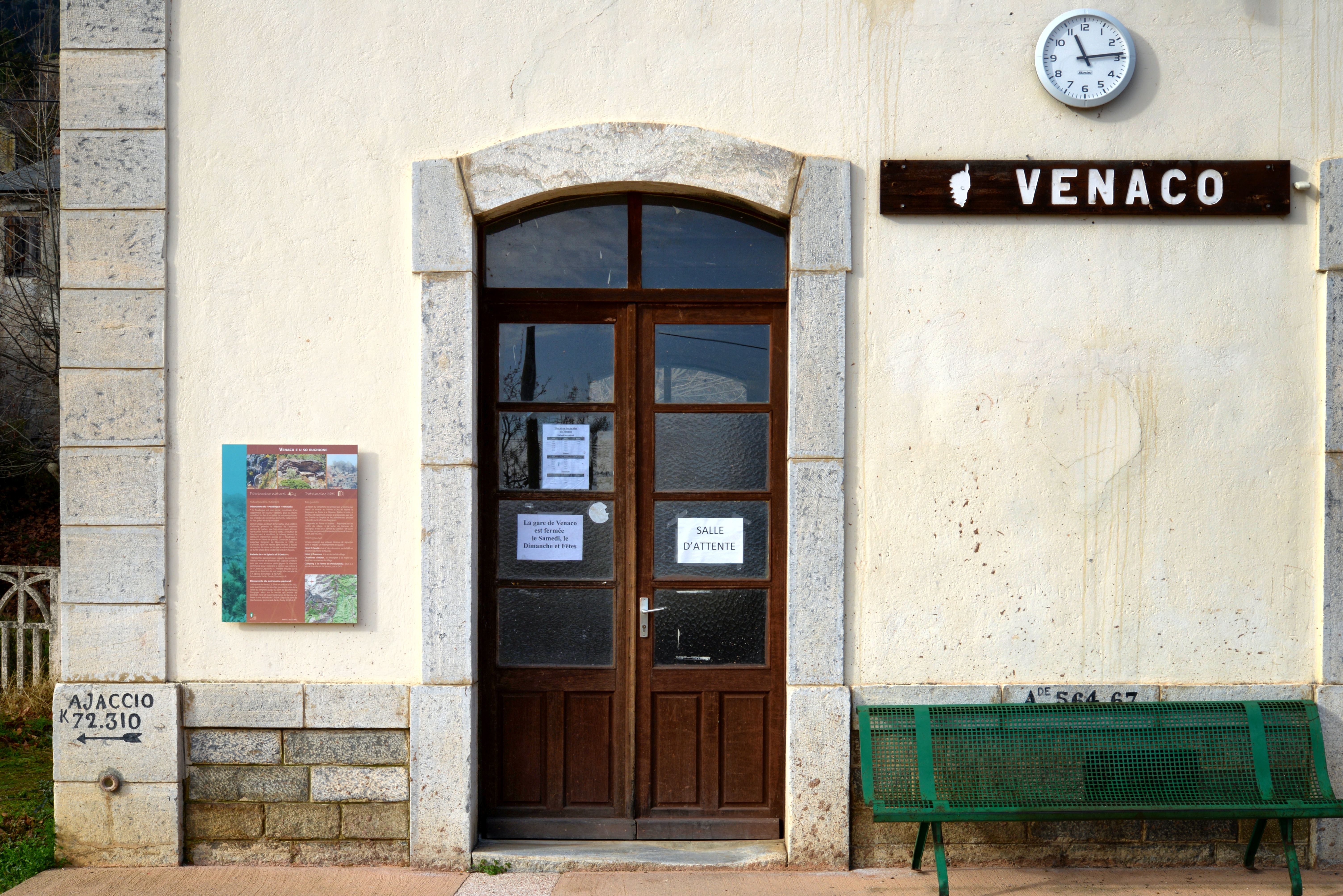 Venaco, Centre Corse - Façade frontale de la gare. À gauche, le point kilométrique d'Ajaccio.